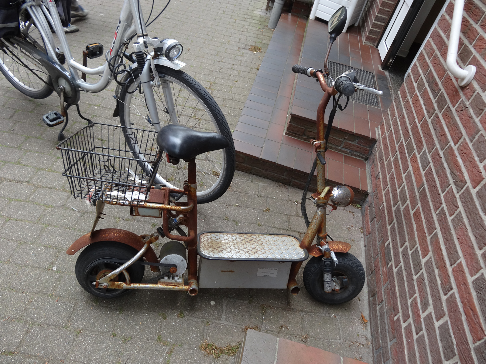 Elektromotorbetriebener Roller (Unikat?) in Wyk auf Föhr